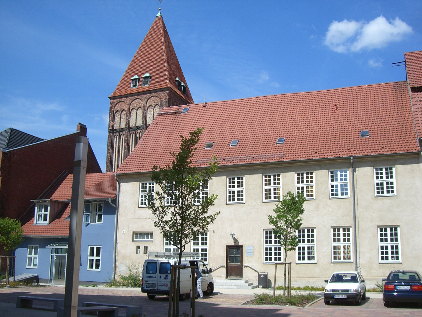 Baltistik, Slawistik und Akademisches Auslandsamt der Ernst-Moritz-Arndt-Universität Greifswald